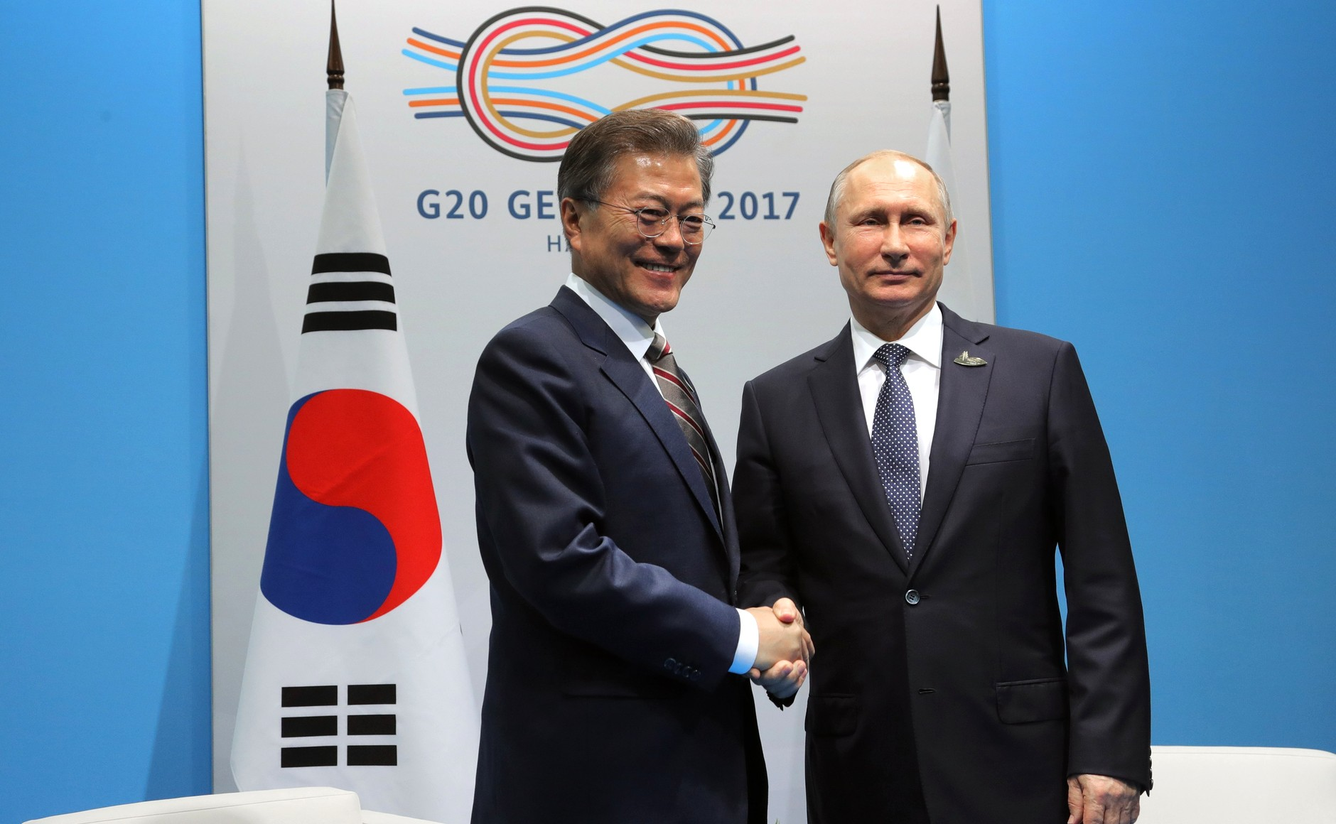 Президент России Владимир Путин с Президентом Республики Кореи Мун Чжэ Ином